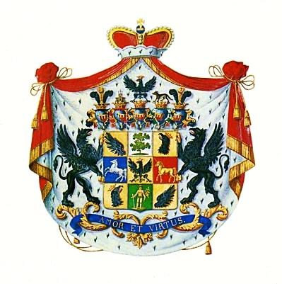 Wappen des Fürsten Hermann von Pückler-Muskau, Freiherr von Groditz (1785-1871).